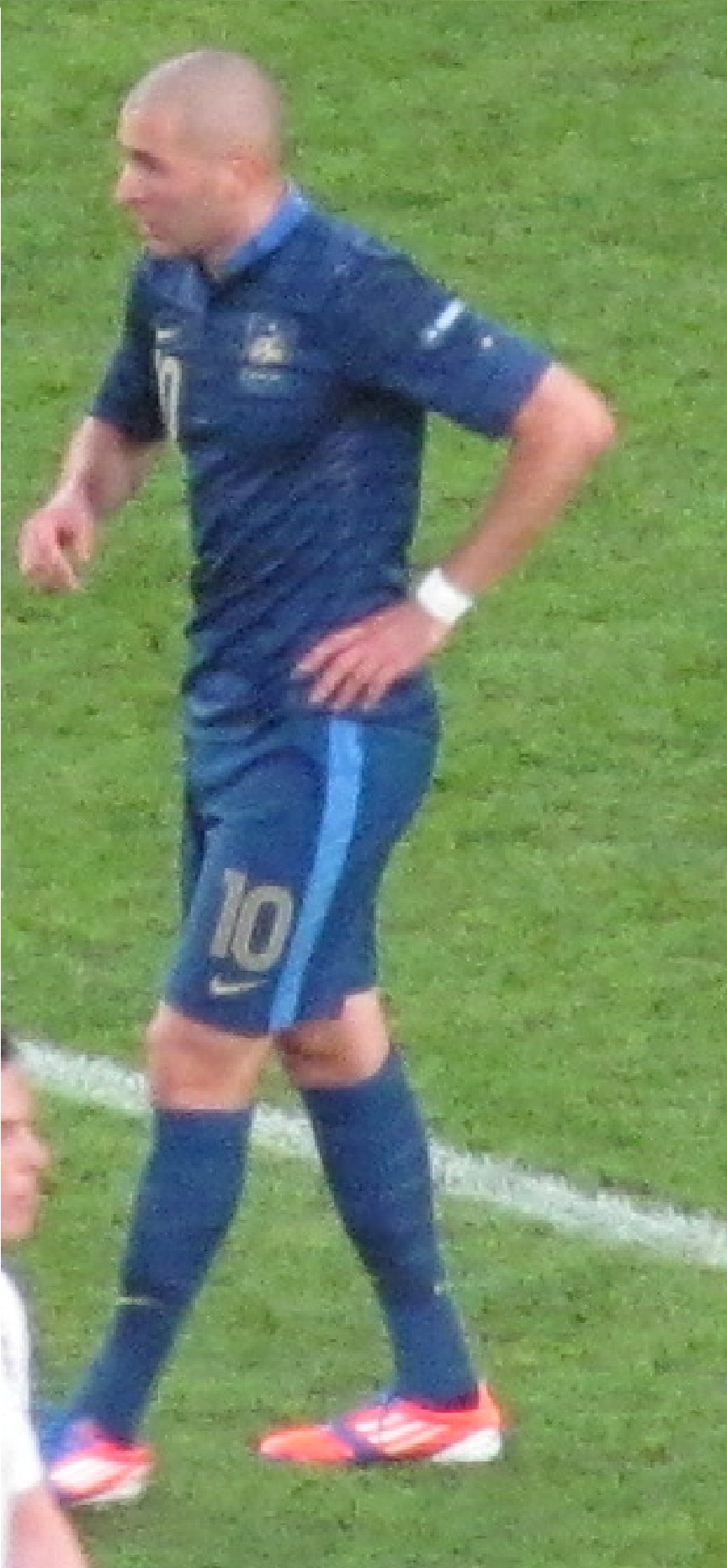 Карим Бензема в матче против сборной Англии